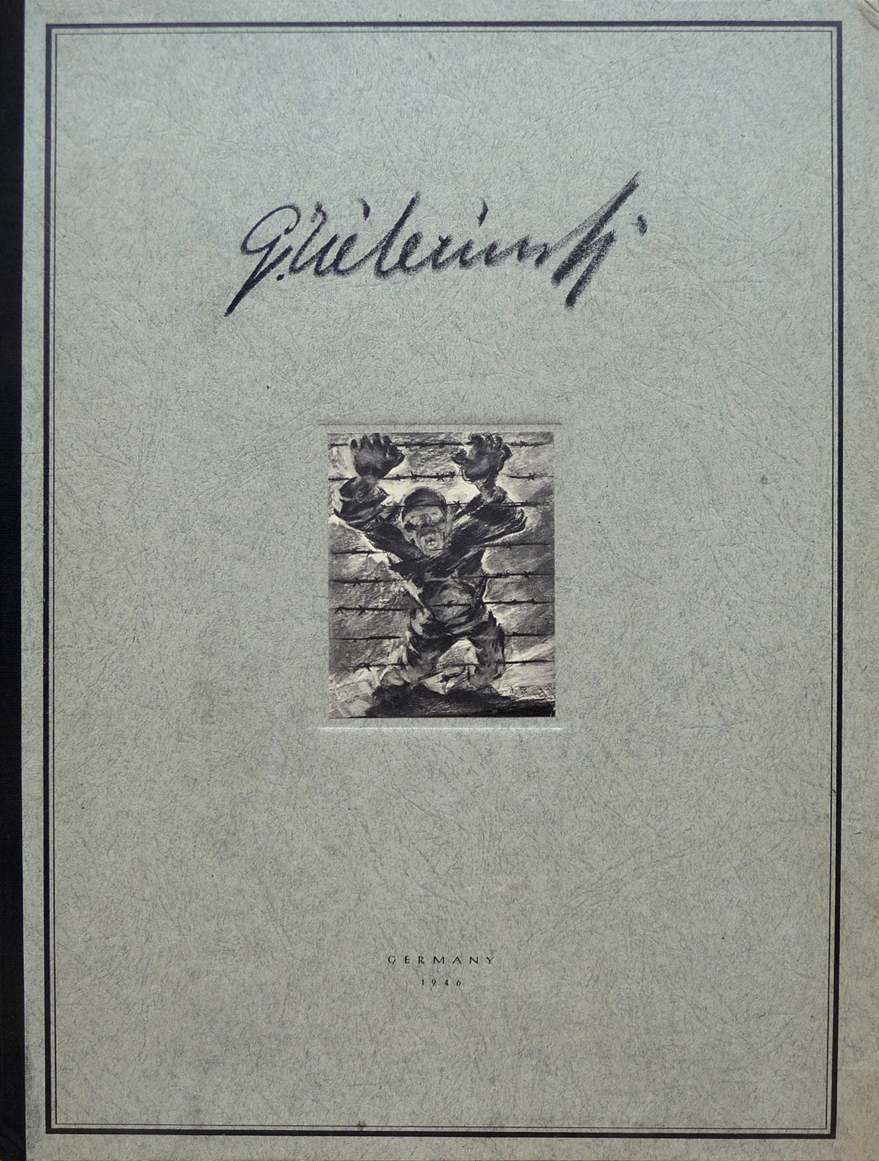 George Zielezinski, Mappe 24 Drawings from the Concentration Camps in Germany, Verlag F. Bruckmann KG, München 1946. Auflage: 1000 Exemplare. 24 Rotogravuren im Format 40 x 30 cm